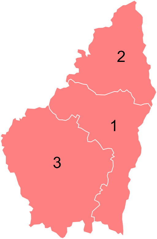 Résultats des élections législatives de l'Ardèche en 2012